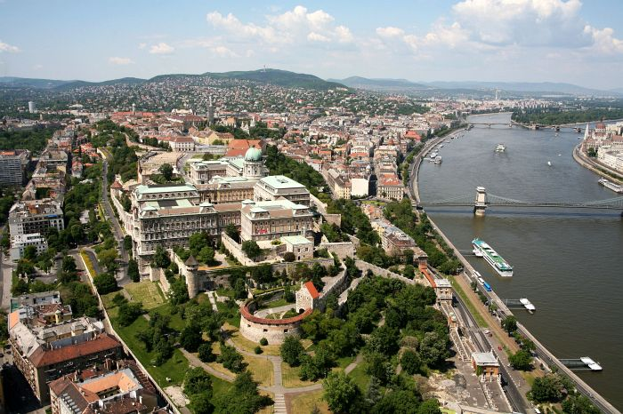 Budai vár, Budapest, Légifotó